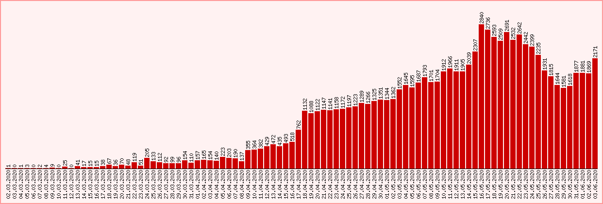 Коронавирус в Саудовской Аравии